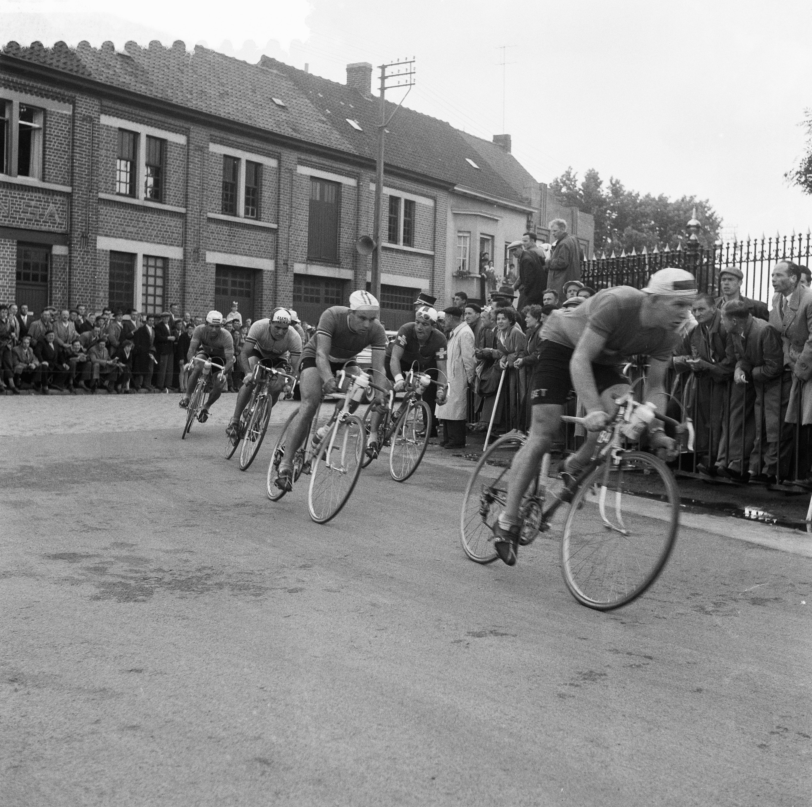 Collectie / Archief : Fotocollectie Anefo Reportage / Serie : Wereldkampioenschappen wielrennen op de weg 1957 Beschrijving : Professionals. Onderweg op het parcours Datum : 18 augustus 1957 Locatie : België, Waregem Trefwoorden : wielrennen Fotograaf : Pot, Harry / Anefo Auteursrechthebbende : Nationaal Archief Materiaalsoort : Negatief (zwart/wit) Nummer archiefinventaris : bekijk toegang 2.24.01.03 Bestanddeelnummer : 908-8782